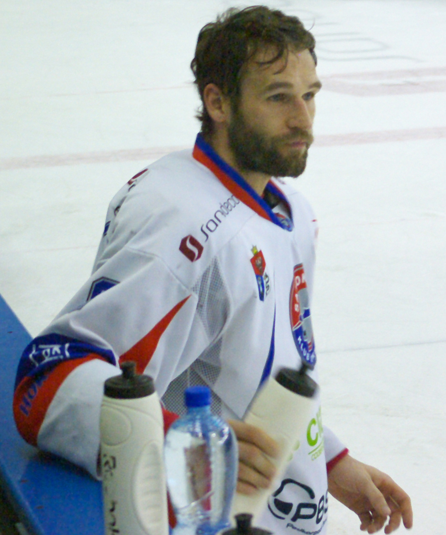 Szósty mecz finałowy o mistrzostwo Polski w hokeju na lodzie w sezonie PHL 2013/2014: Ciarko PBS Bank KH Sanok – GKS Tychy (2:0), 3 kwietnia 2014 w Sanoku (Arena Sanok). Martin Vozdecký